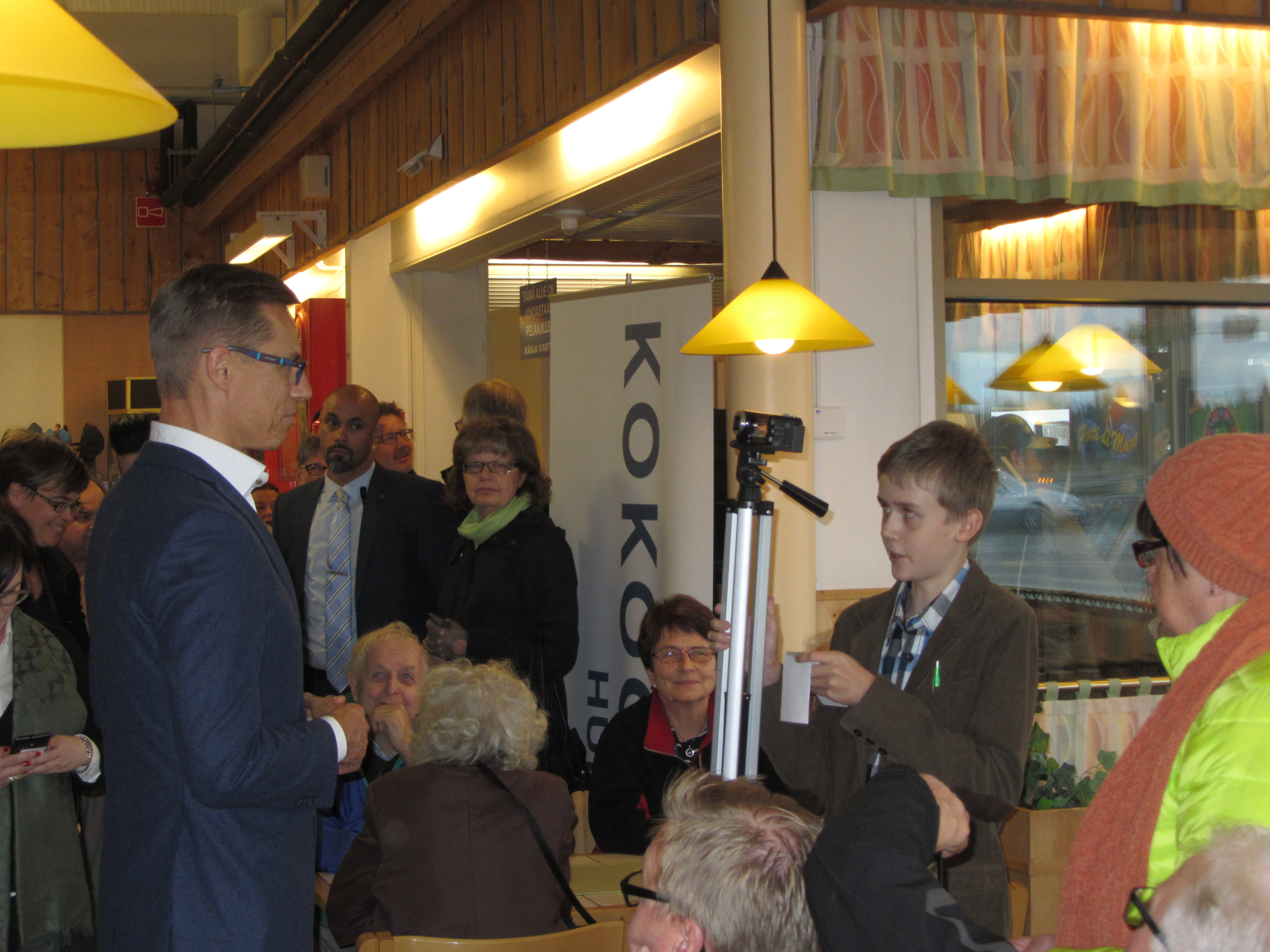 Nuori päätoimittaja Tuomas Kuhalainen haastattelemassa pääministeri Alexander Stubbia Huittisissa lokakuussa 2014.